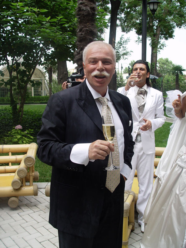 Badri Patarkazischwili, Präsident des Georgischen Unternehmerverbands, Georgien